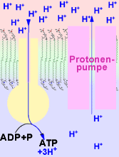 Bild-CC-by-asw-hamburh.de (Original text: Protonenpumpe)